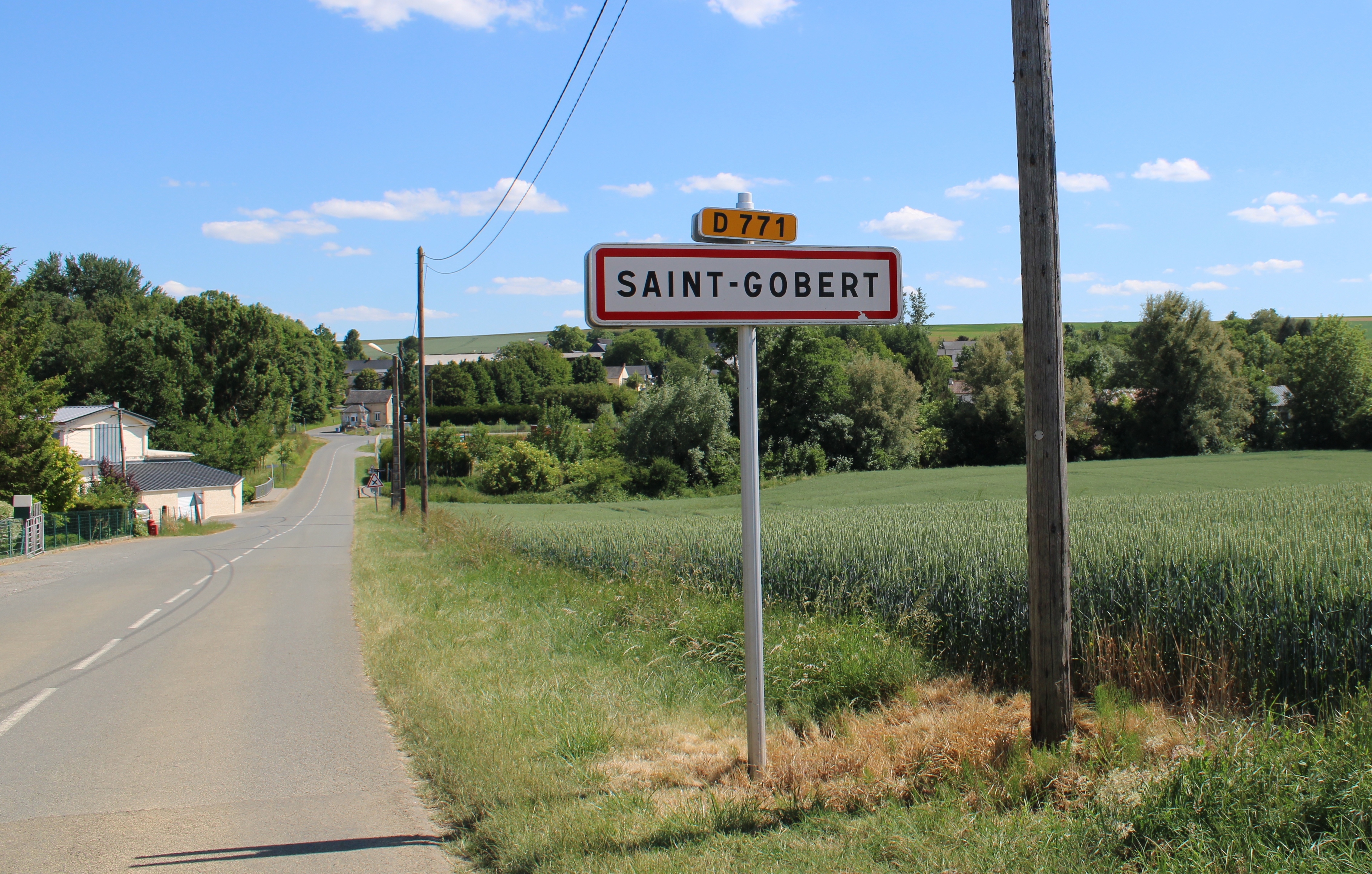 Entrée du village